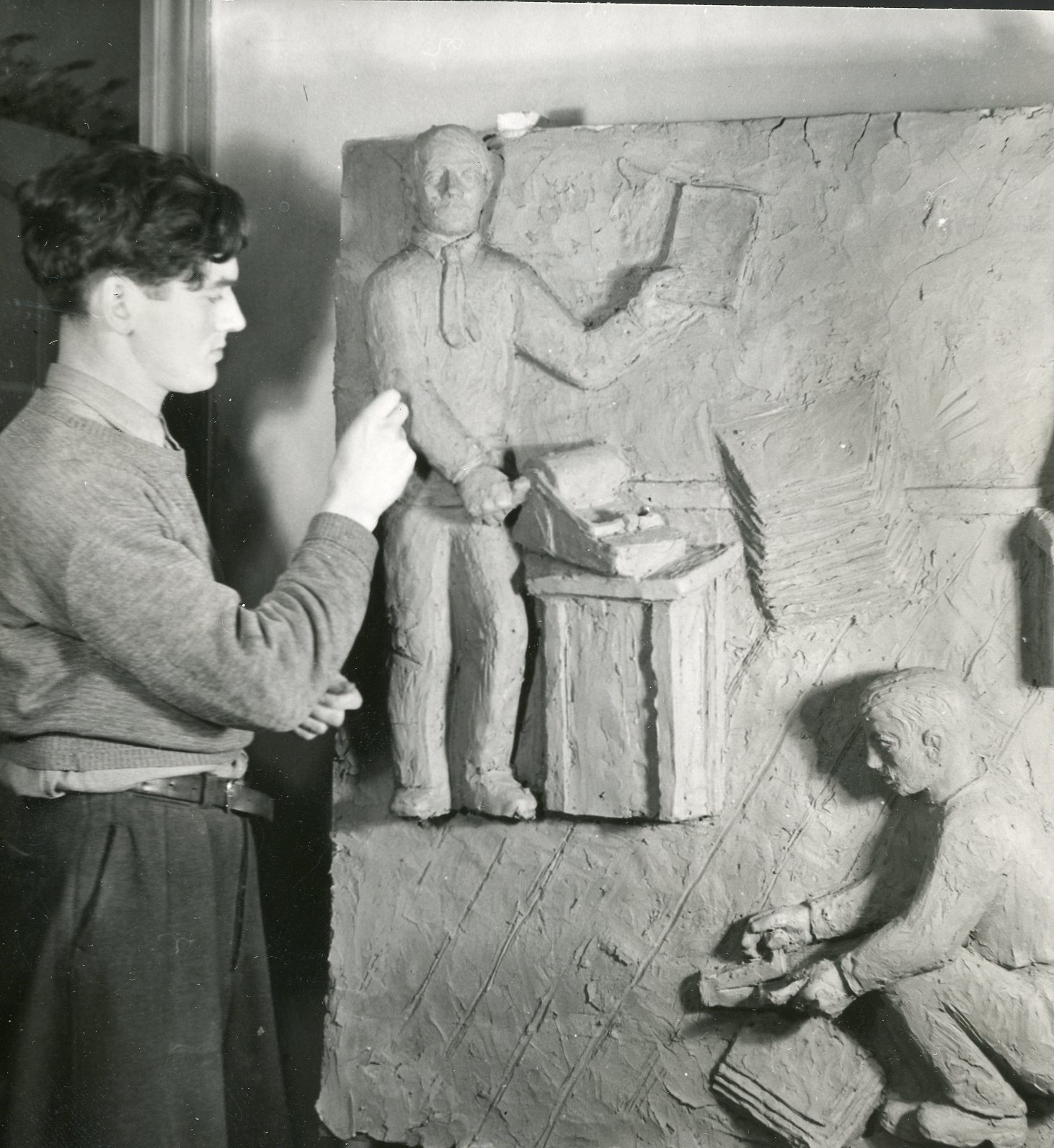 ”Den norske billedhugger Odd Hilt foran sine skulpturer.” RA/PA-1209/Uc/66/4/S 959D